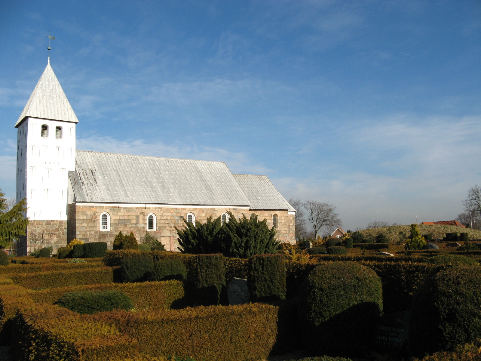 Bryndum kirke, Bryndum sogn, Esbjerg kommune (former: Skads Herred, Ribe Amt). Kirken set fra syd, med oldtidshøj øst for kirken